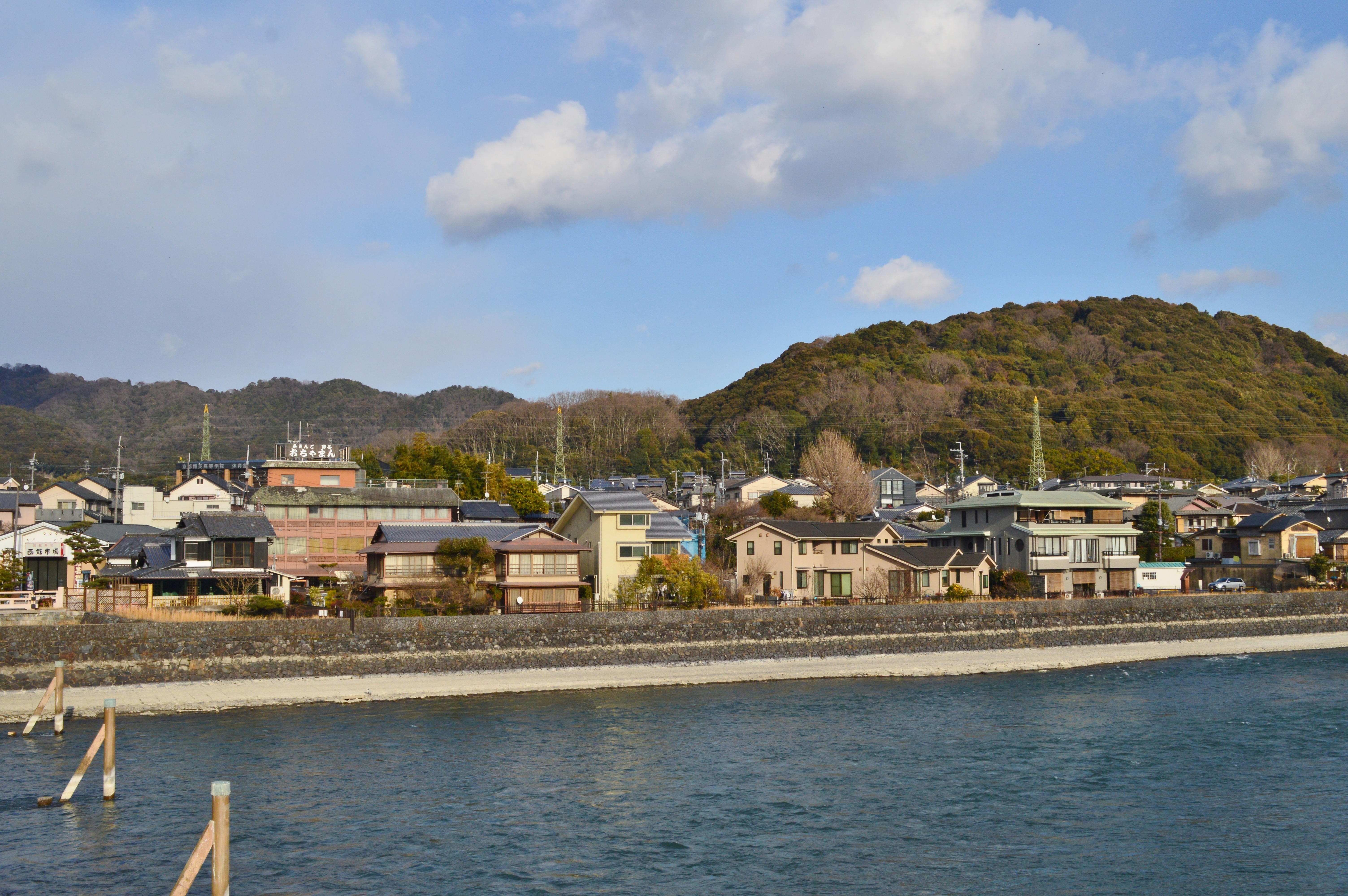 二子山 (宇治市) 遠景